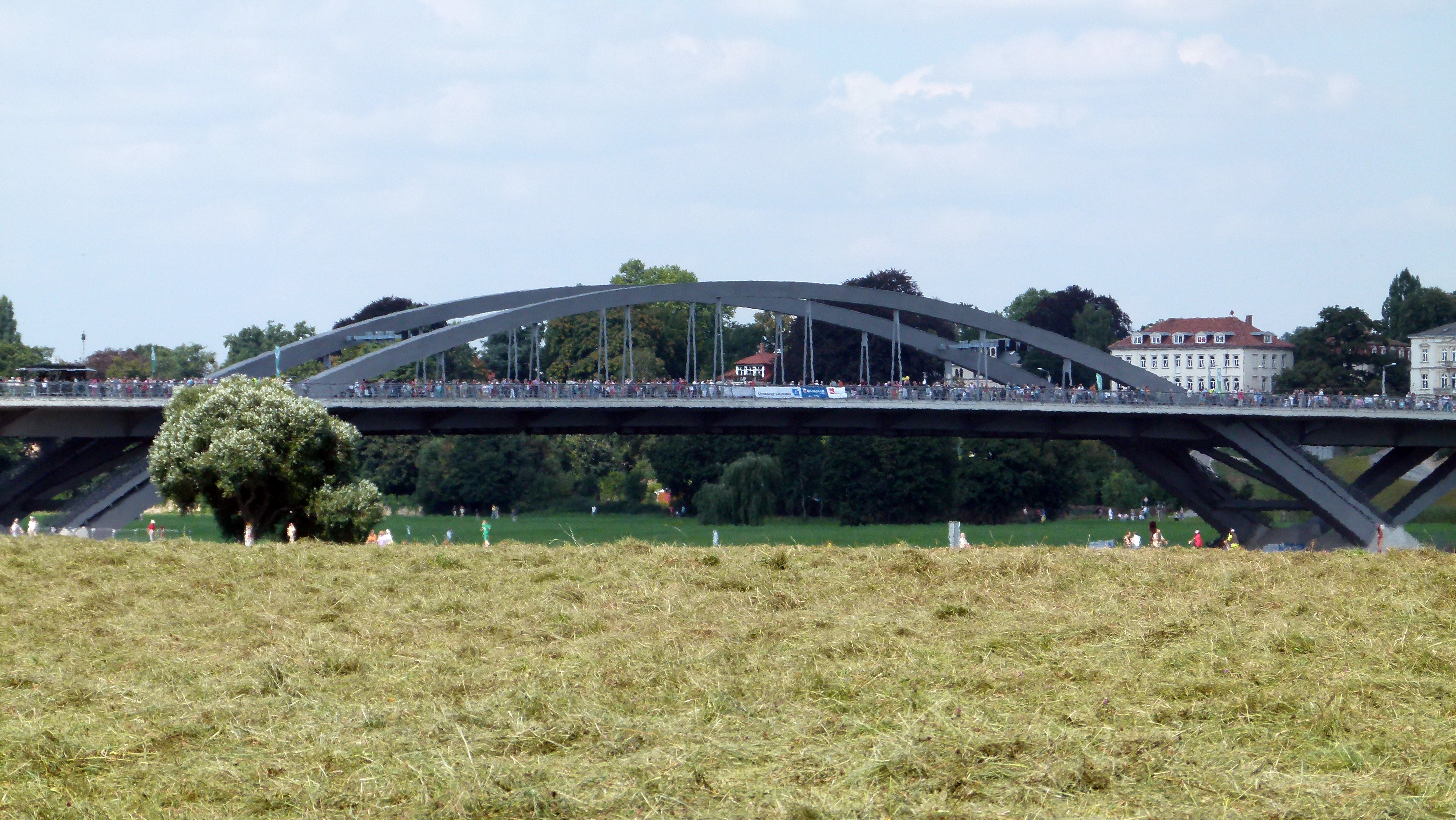 Die Waldschlößchenbrücke am Eröffnungstag - 24. August 2013 - Brückenfest, Dresden